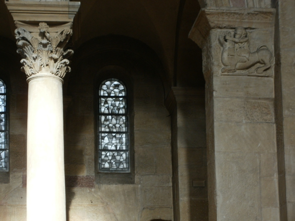 Speyrer Dom